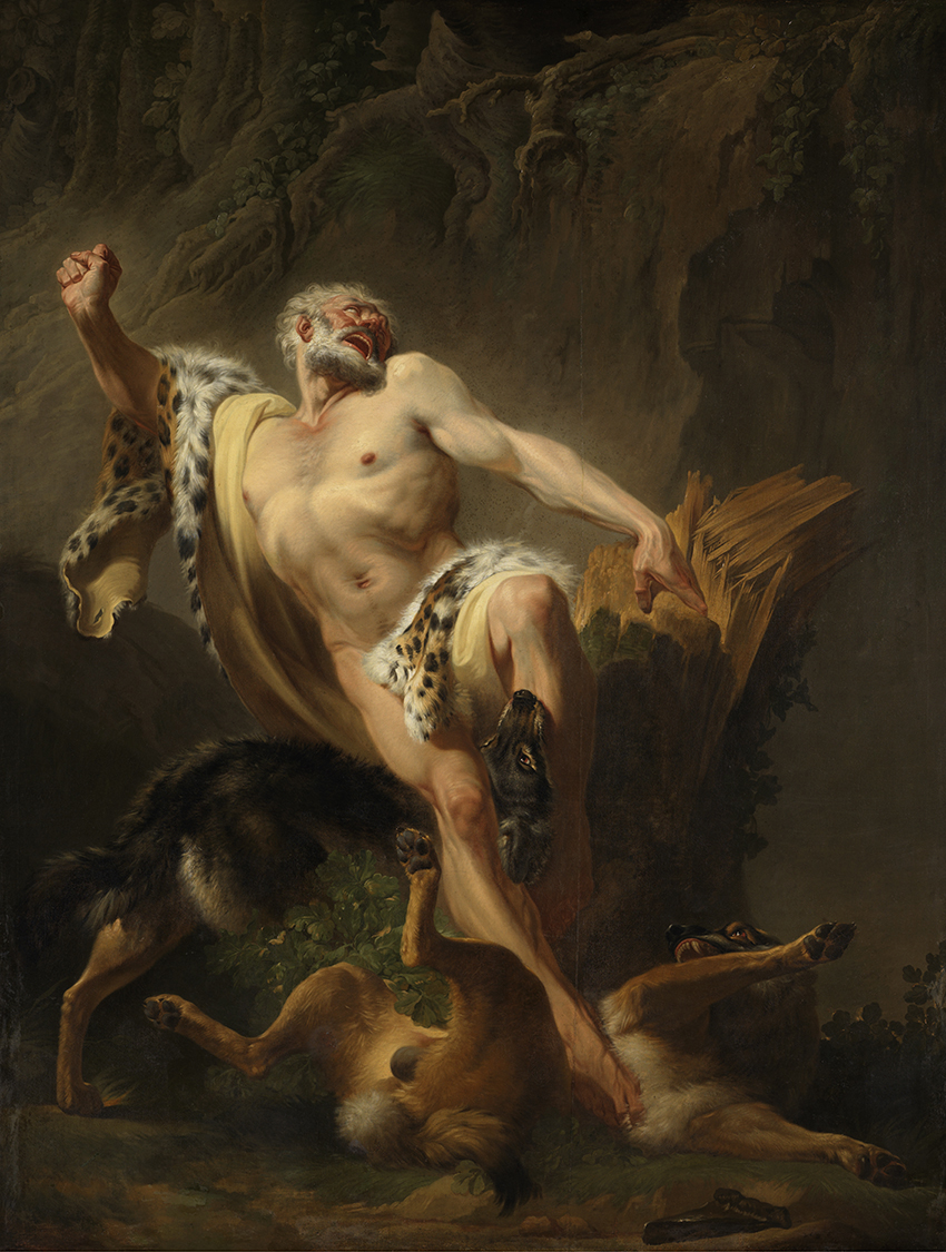 Milo van Croton (Joseph Benoît Suvée, 1763); collection: Musea Brugge - Groeningemuseum